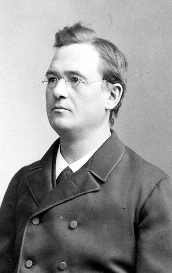 Jakob Reeb (1842-1917) katholischer Priester und bayerischer Landtagsabgeodneter